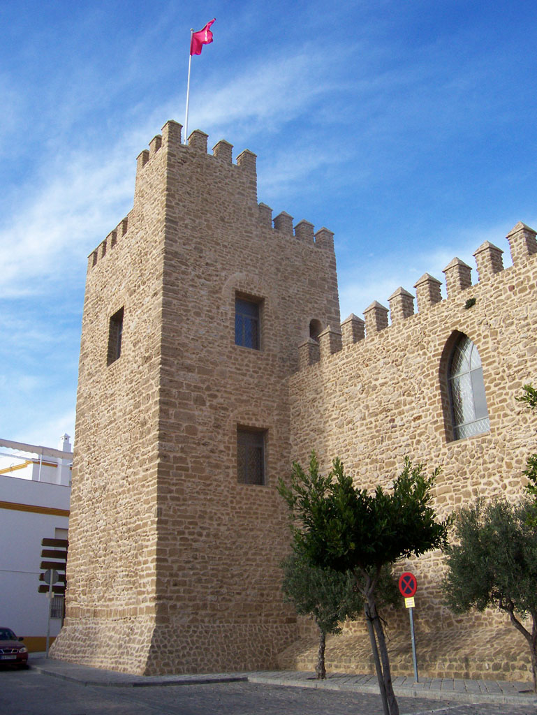 Exterior del Castillo de Luna, Rota-Cádiz-Andalucía-España